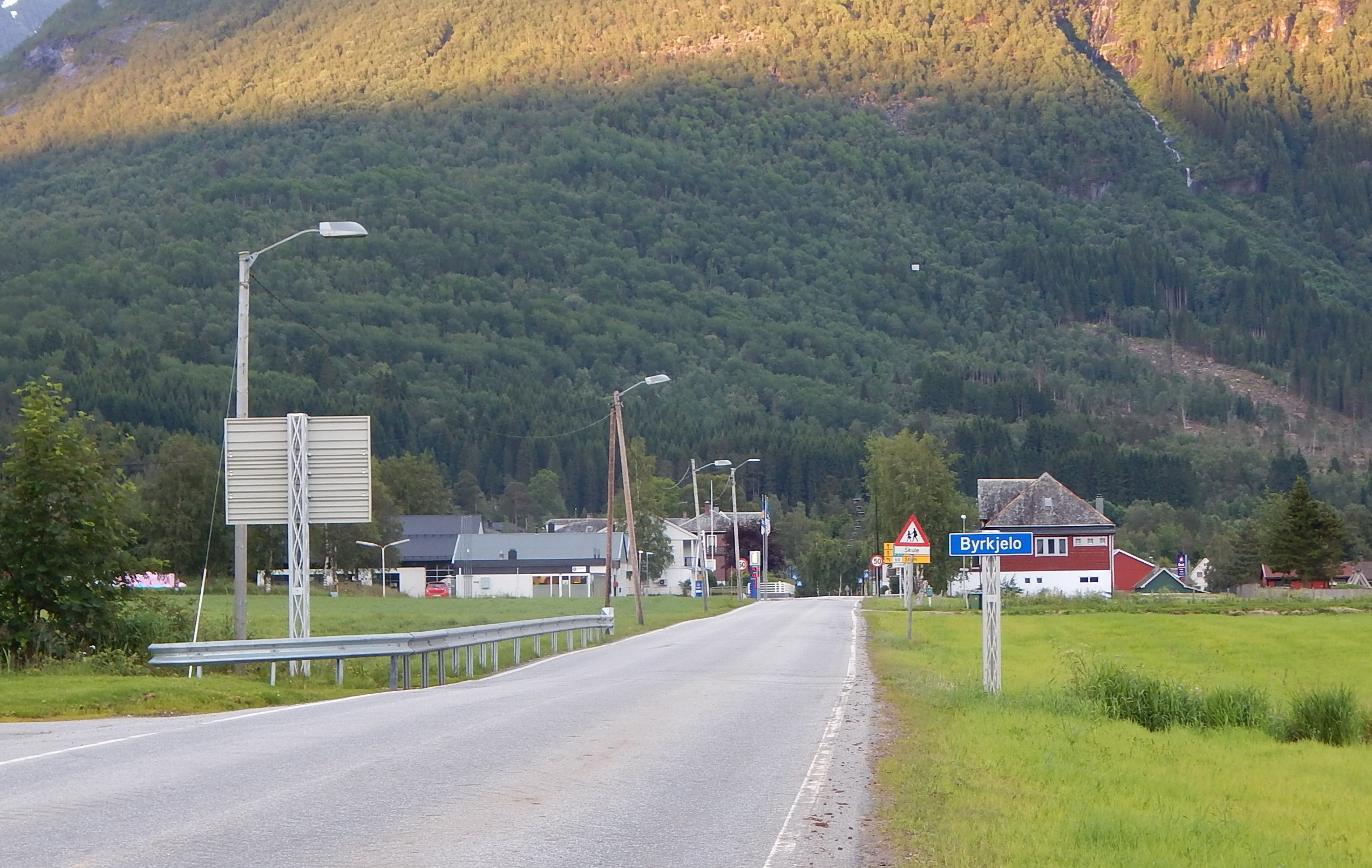 E39 gjennom Byrkjelo